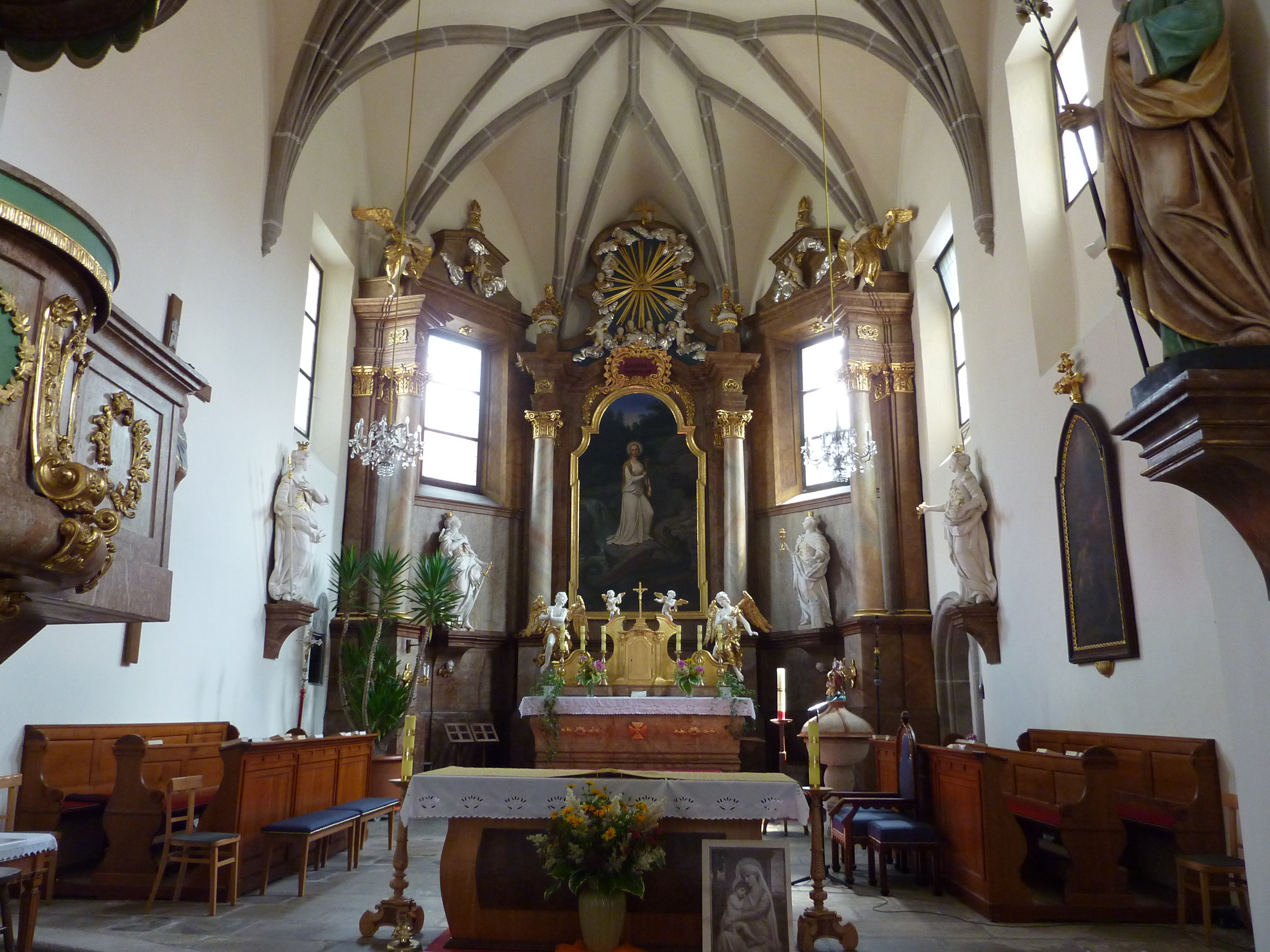 Pfarrkirche hl. Margareta in Heidenreichstein, Niederösterreich - Altar